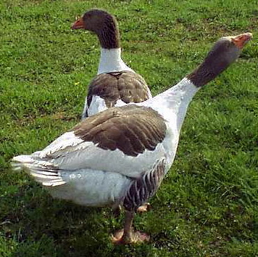 Pommerngans